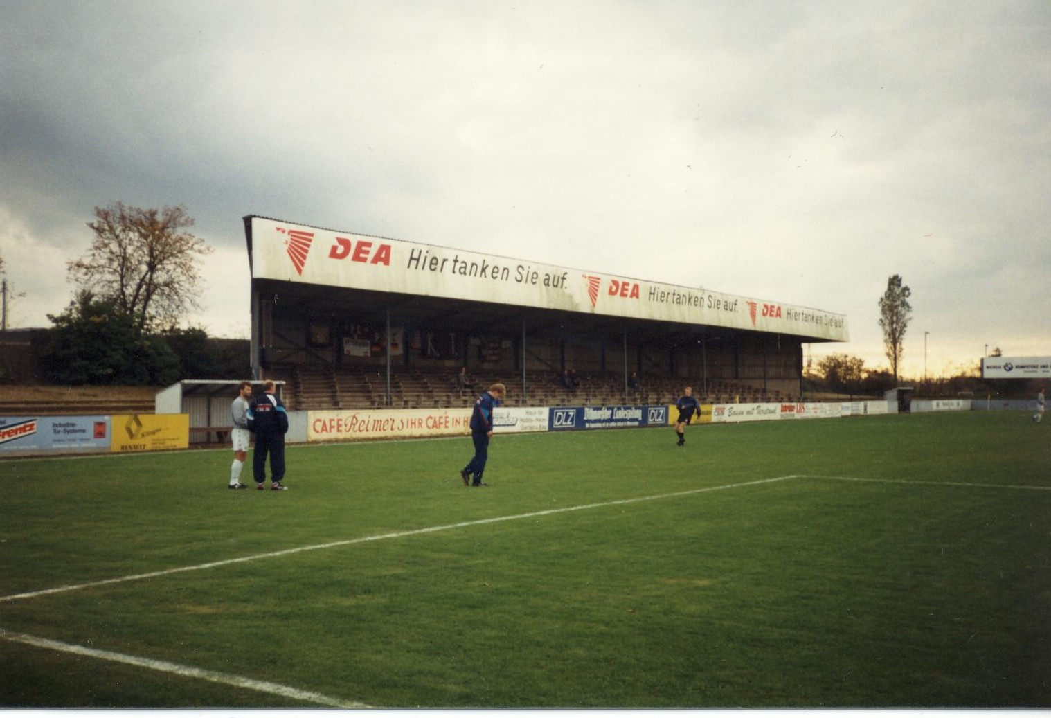 Stadion an der Meldorfer Strasse in Heide vorm Spiel Heider SV-FC St.Pauli(A))